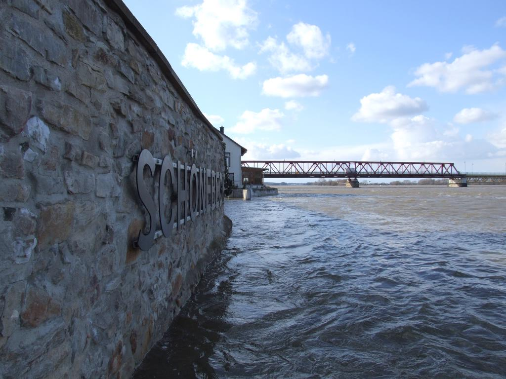 Hochwasser am Salzblumenplatz